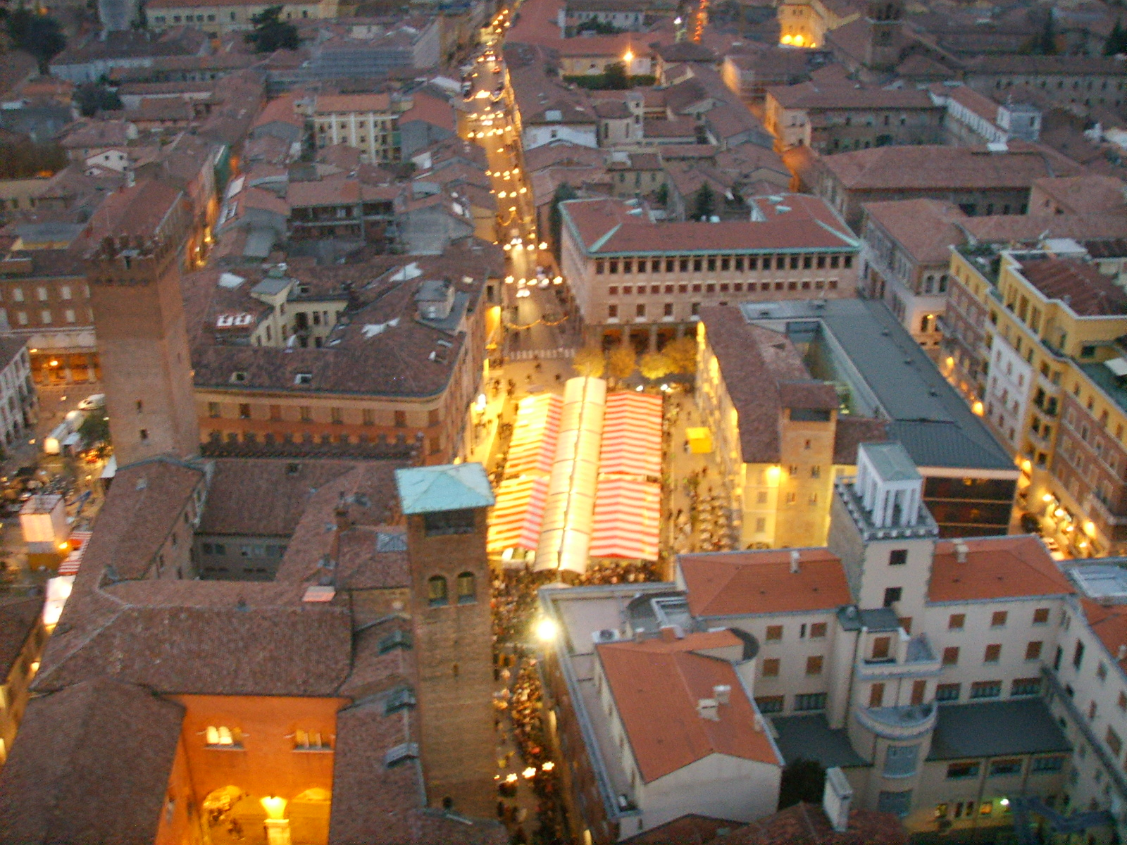 Cremona, vista dal torrazzo 05 mercato